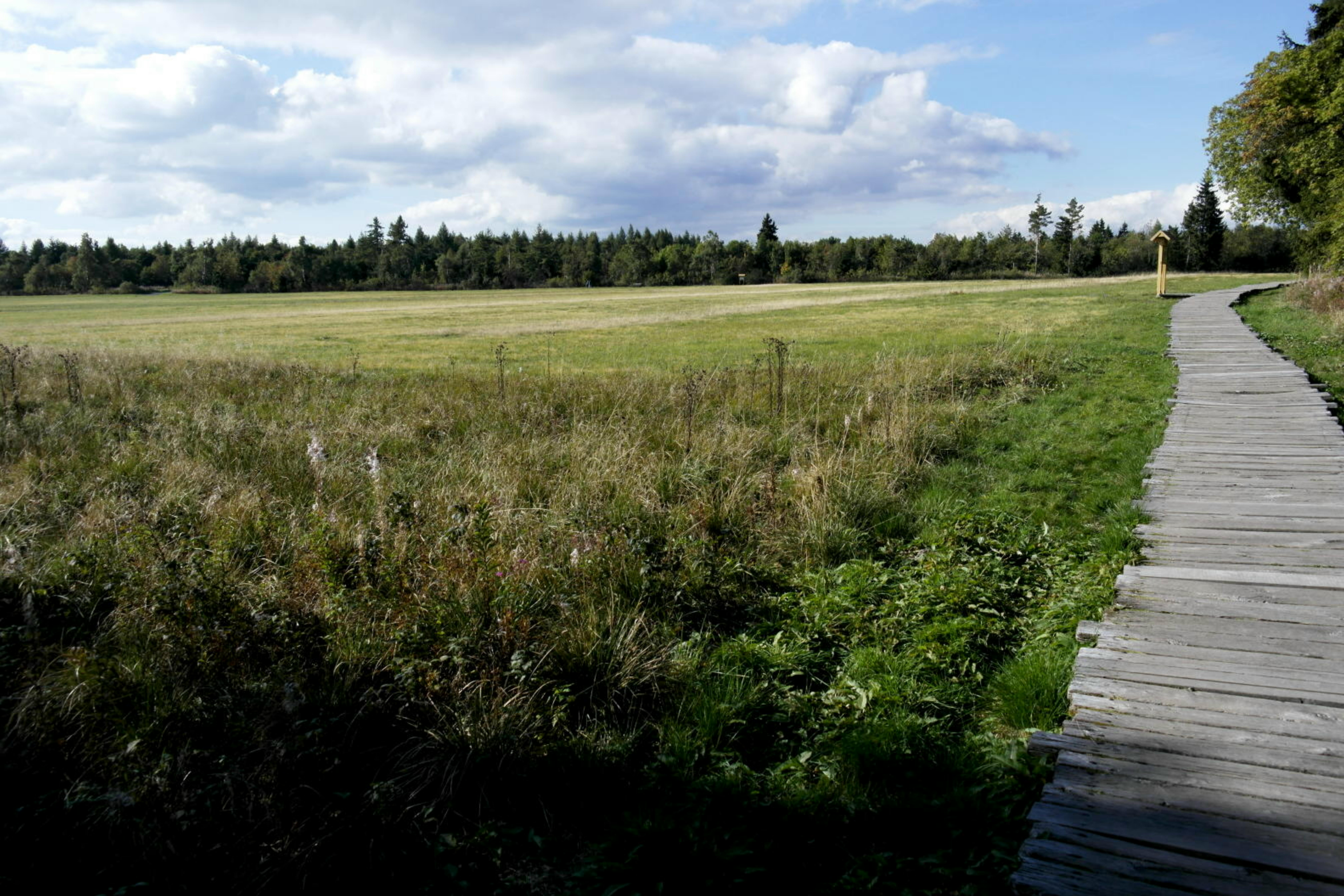 (NSG:BY-NSG-00152.01)_Lange Rhön. Schwarzes Moor im Biosphärenreservat Bayrische Rhön.